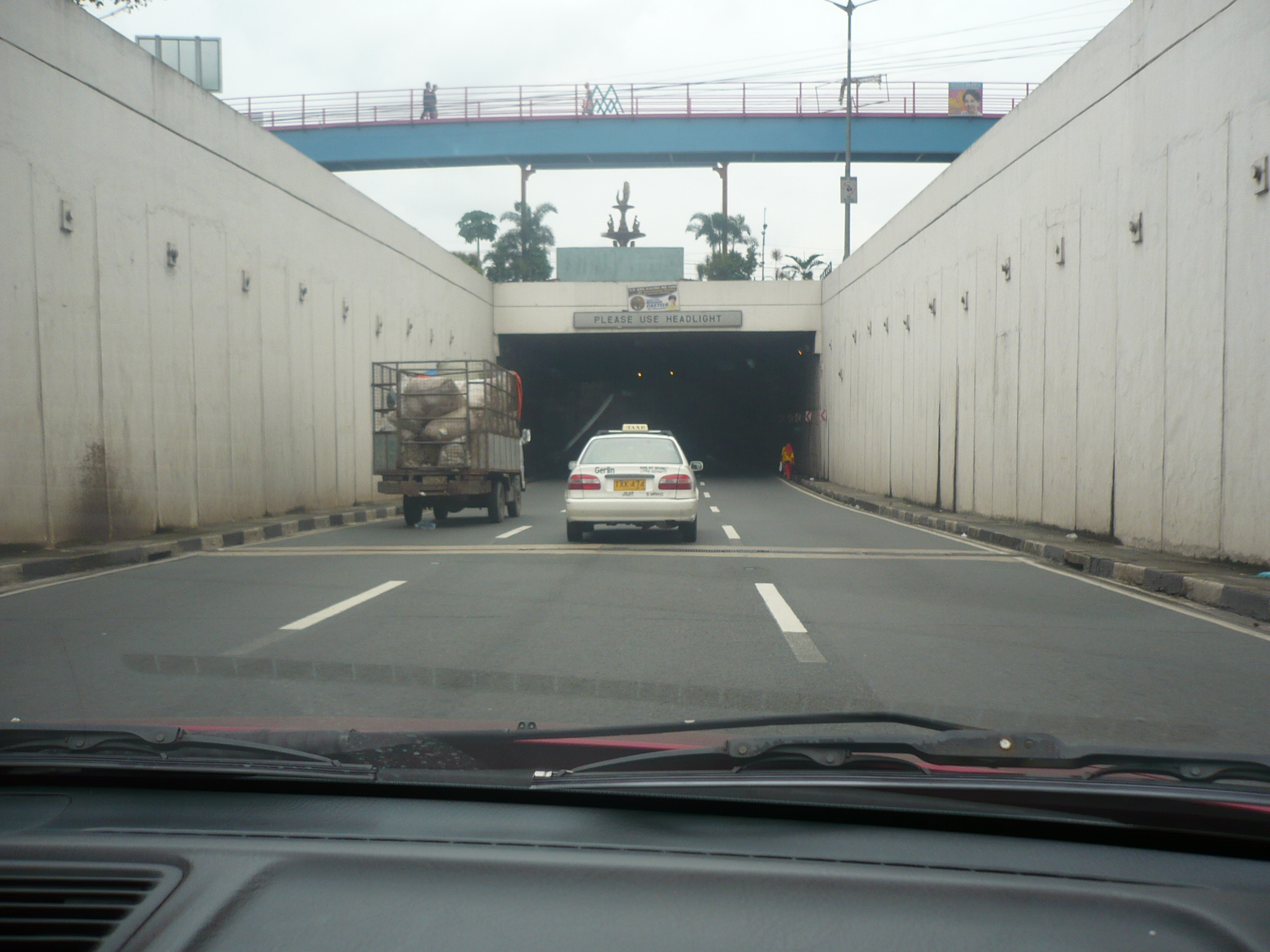 Batasan Tunnel along Batasan Road